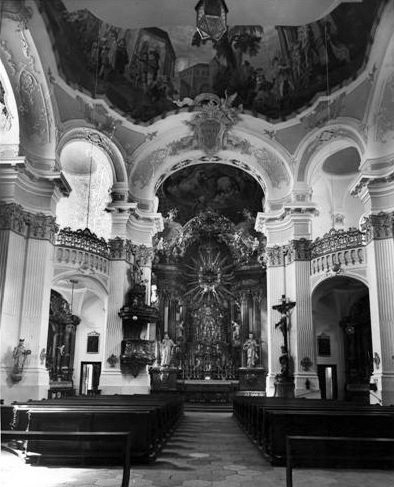 Historische Innenaufnahme der 1945 zerstörten Rokoko-Klosterkirche des Augustinerklosters ob der Schutter